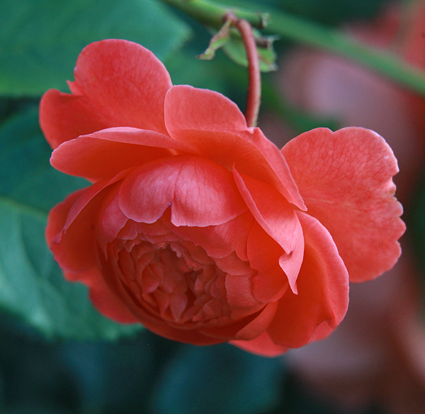 Роза 'Summer Song'. Россия. Владимирская область